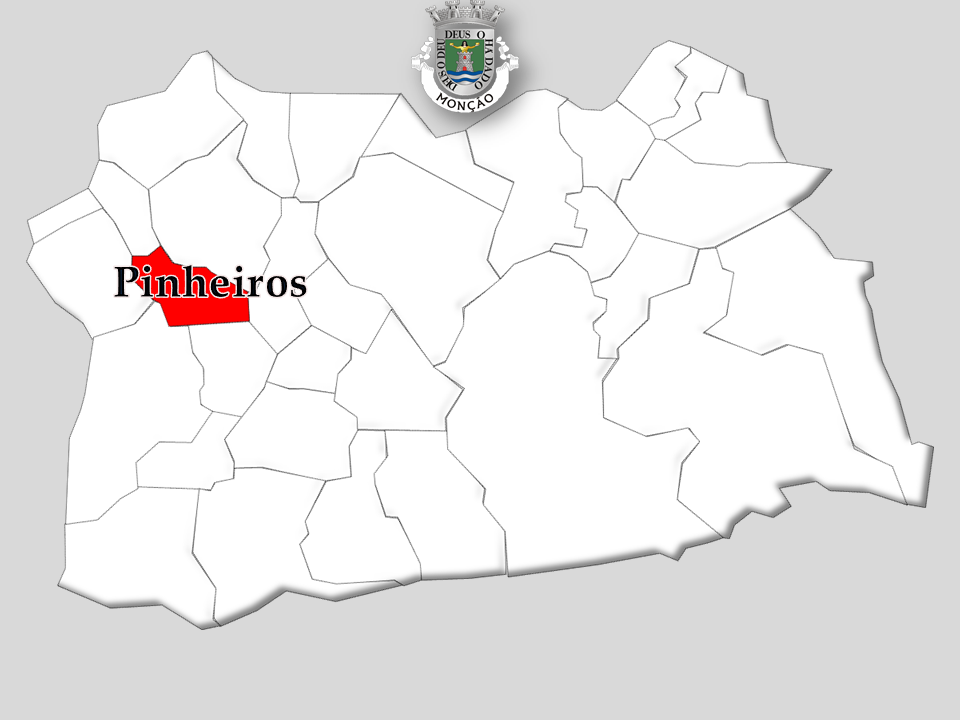 Censos 1864/2011